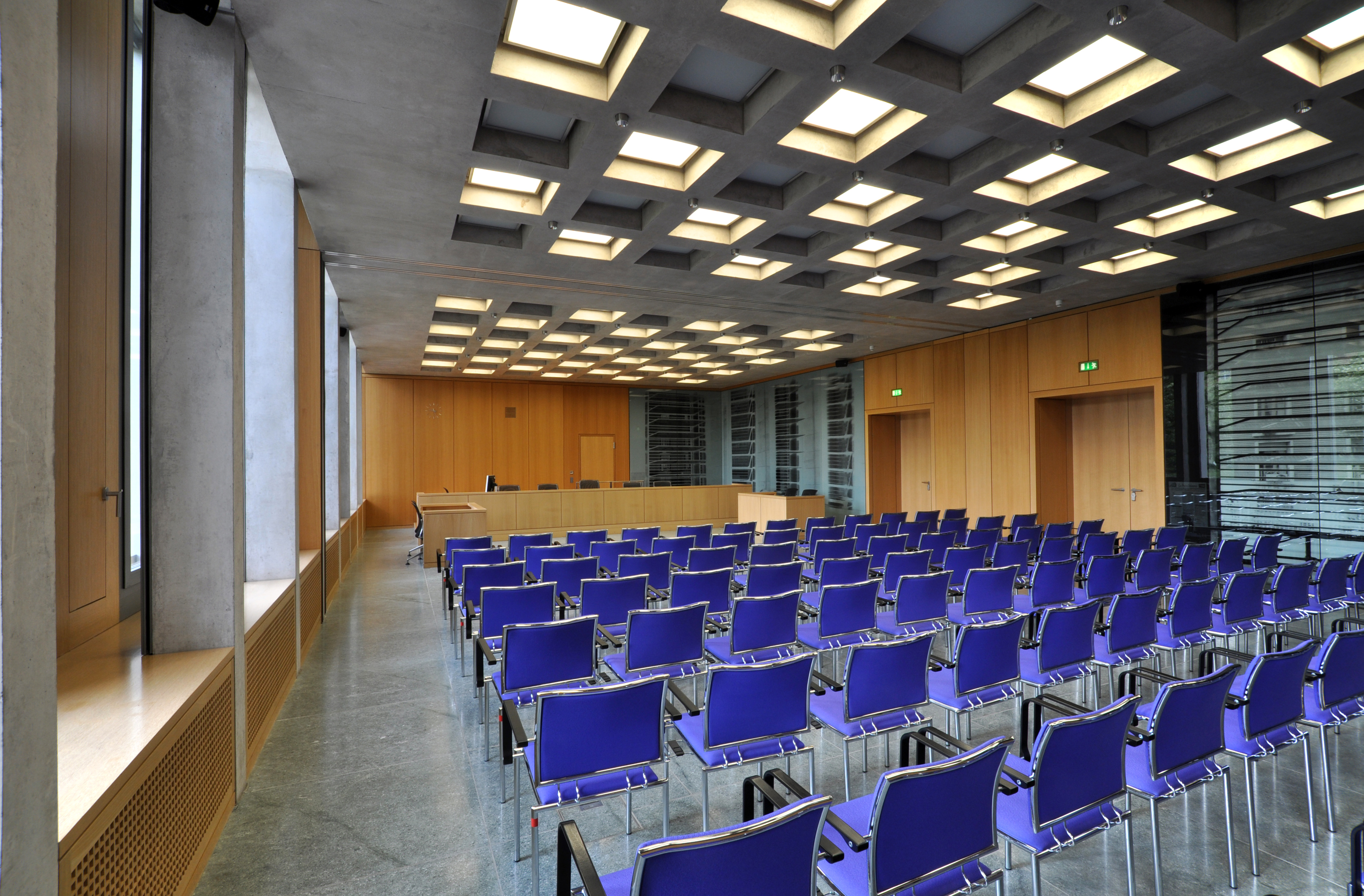 Bundesarbeitsgericht Erfurt Großer Sitzungssaal